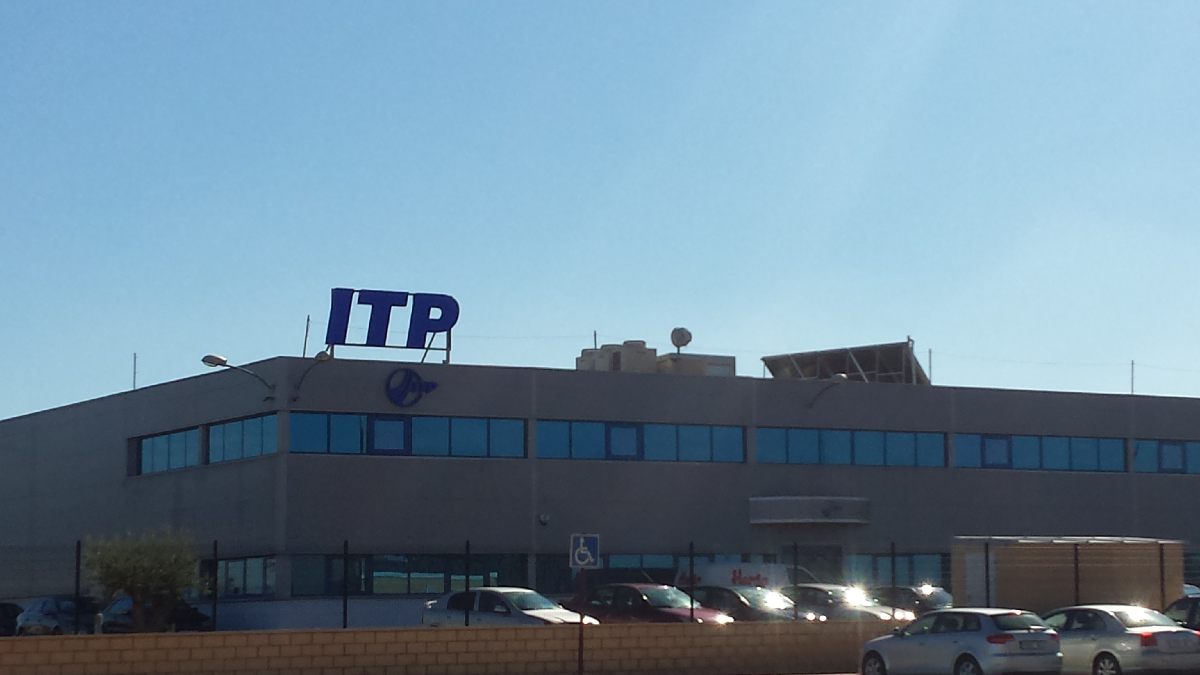 ITP Albacete